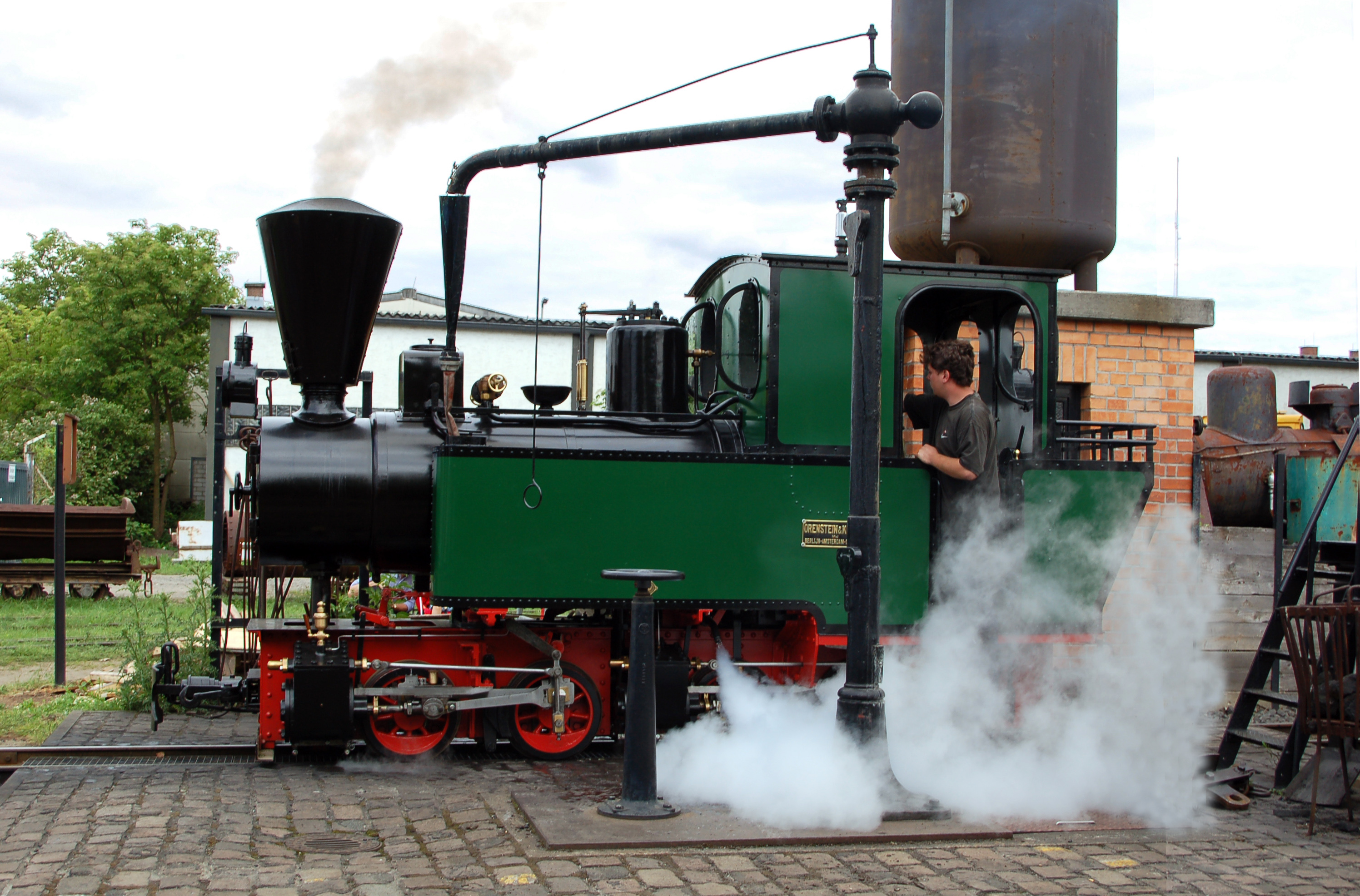 Lok Orenstein & Koppel Mallet (B'Bn4vt 3902, Bj. 1909, 30 PS) des Frankfurter Feldbahnmuseums beim Betanken